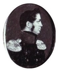 Портрет Голицынa, Николай Борисович.